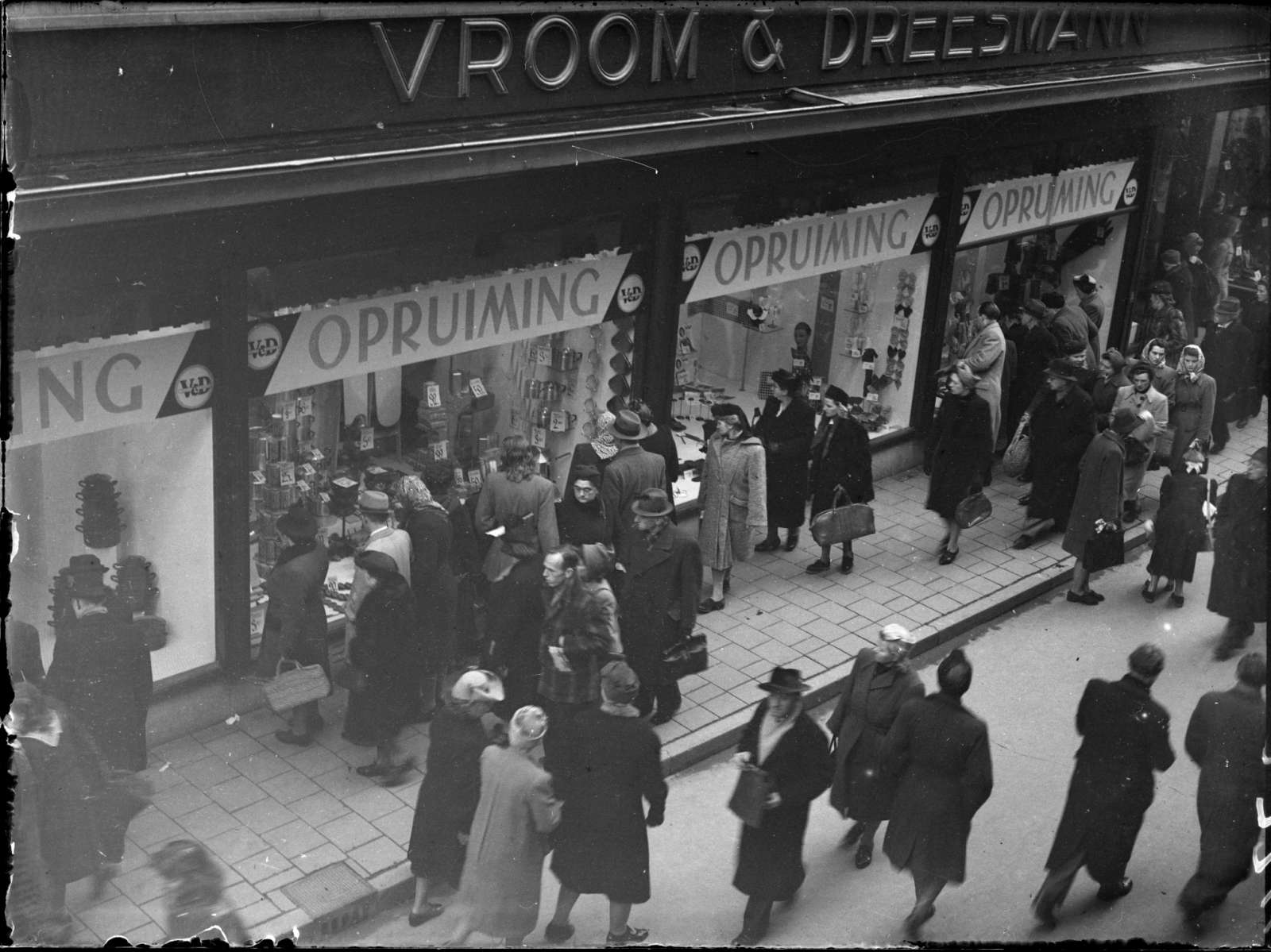 Opruiming bij Vroom & Dreesmann, Kalverstraat, Amsterdam, 6 januari 1948 Foto Ben van Meerendonk / AHF, collectie IISG, Amsterdam